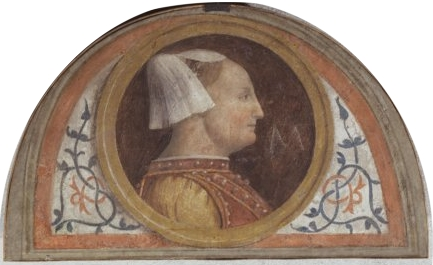 Bianca Maria Visconti. Lunetta di Bernardino Luini (1522/26), proveniente dalla Casa degli Atellani a Milano, oggi conservata nel Museo d'arte antica del Castello Sforzesco di Milano.